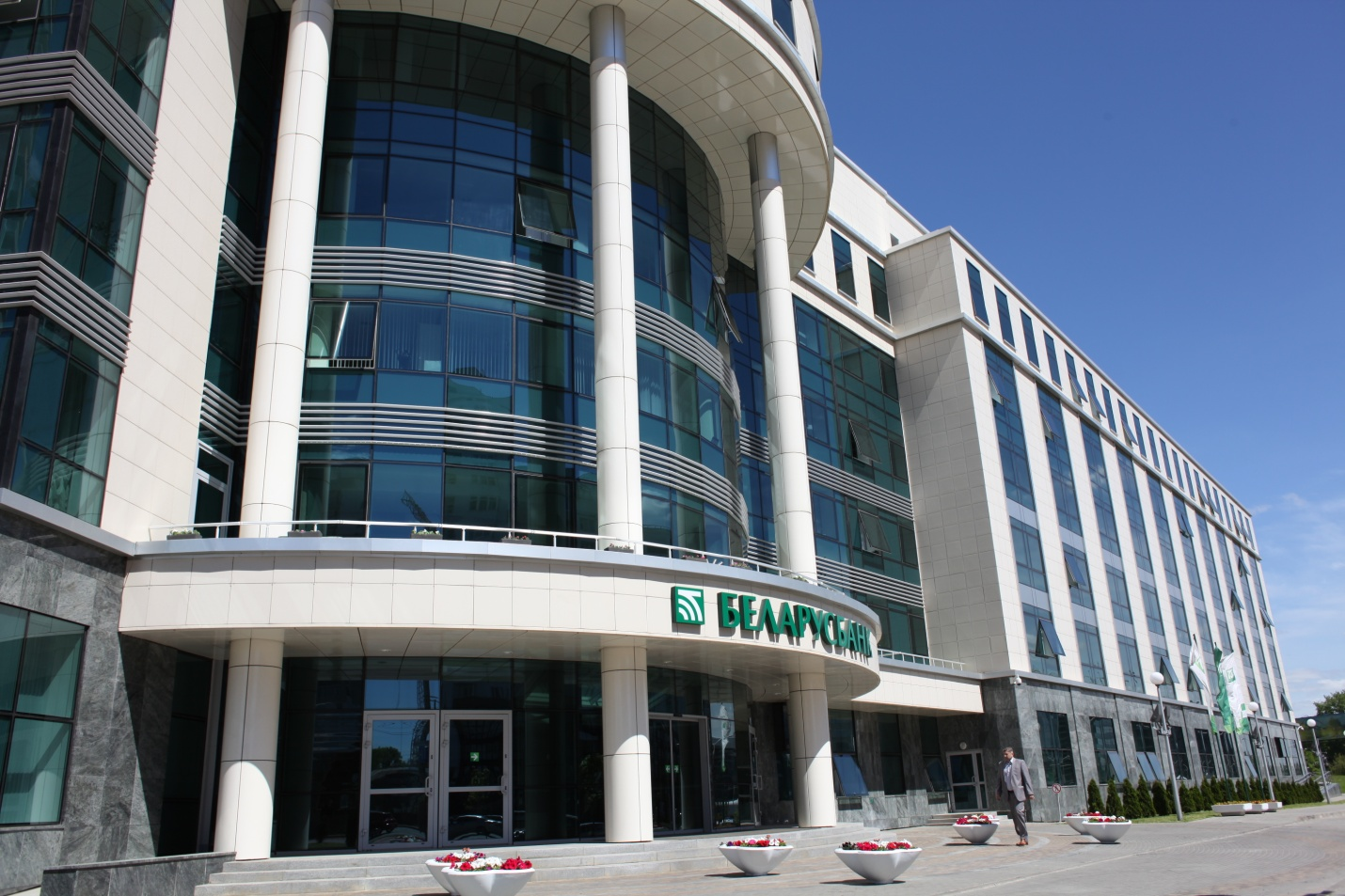 Здание головного офиса ОАО «АСБ Беларусбанк» в г.Миннске